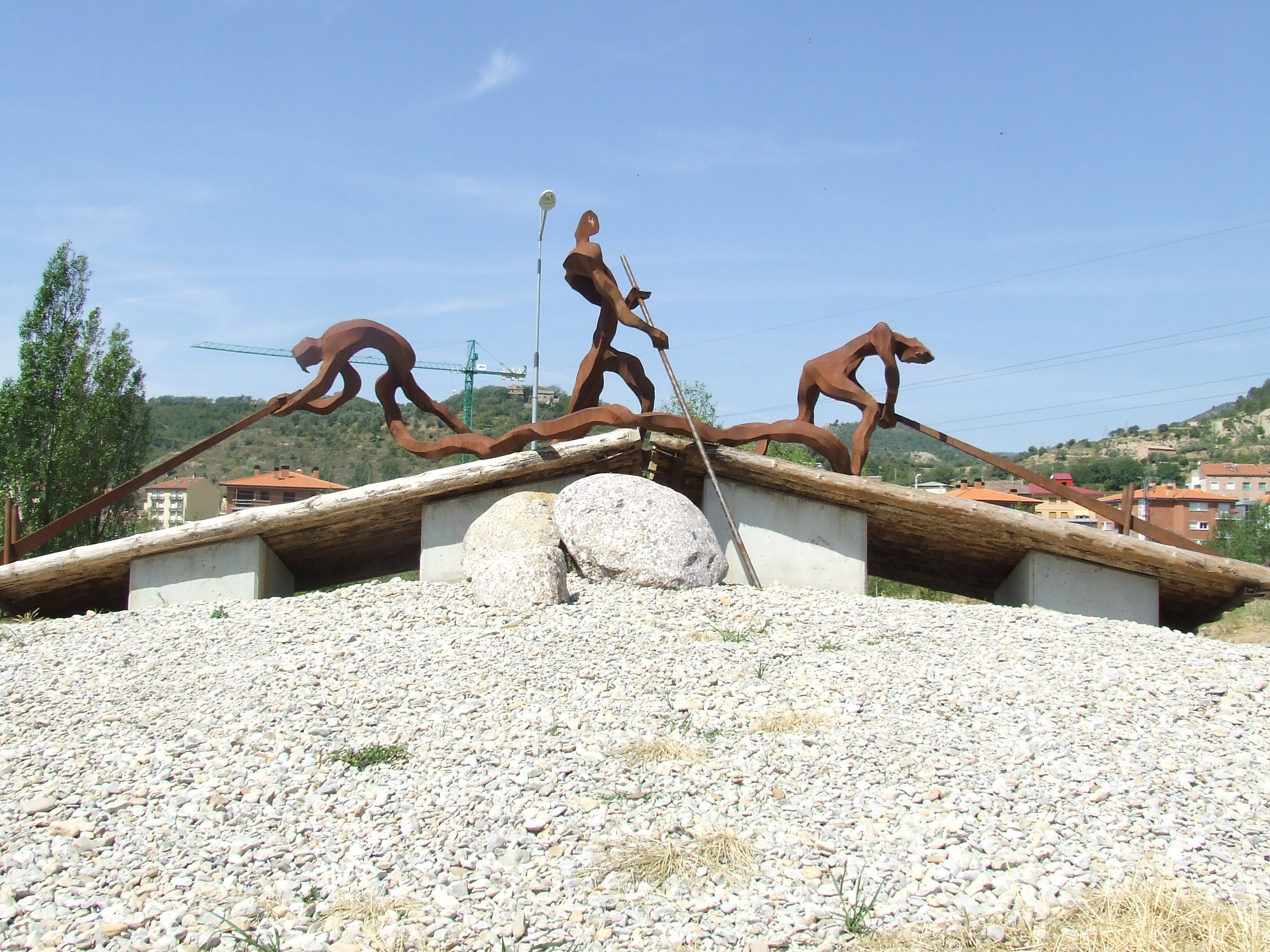 Monument als Raiers a la Pobla de Segur (Pallars Jussà), obra d'Anselm Cabús y Torra, 2007